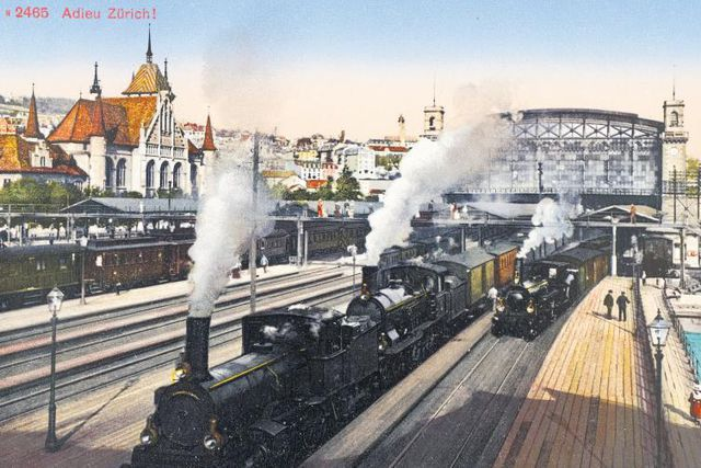 Der Zürcher Hauptbahnhof um 1900: Dampfzüge verlassen die Haupthalle. Links ist das Landesmuseum zu sehen.